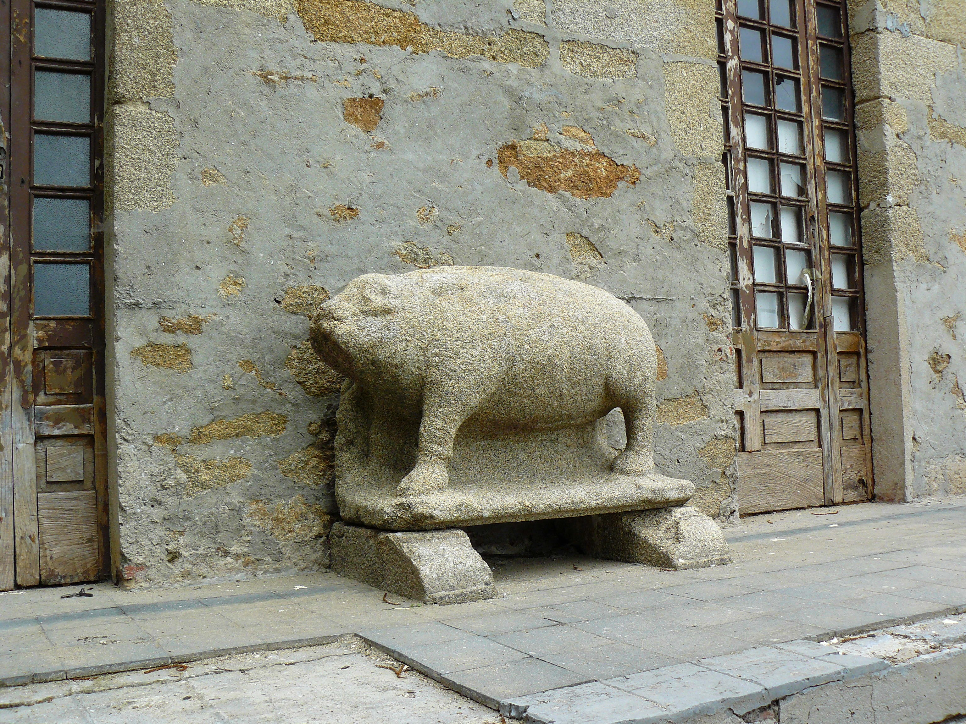 Porquiño ou xabarín emblema dos Andrade. No Mosteiro de Montefaro